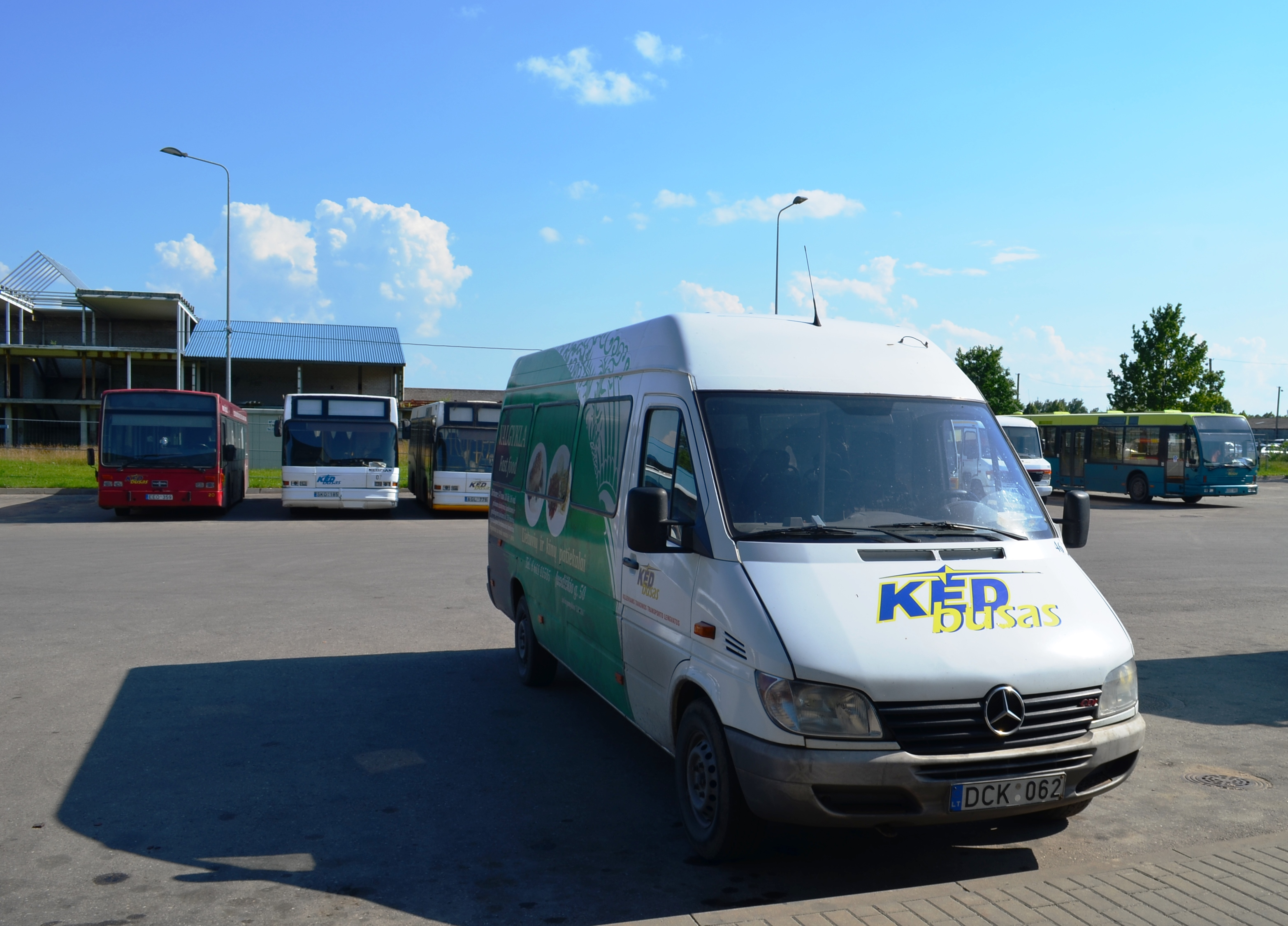 "Kėdbuso" mikroautobusas Mercedes, Kėdainių autobusų stotis